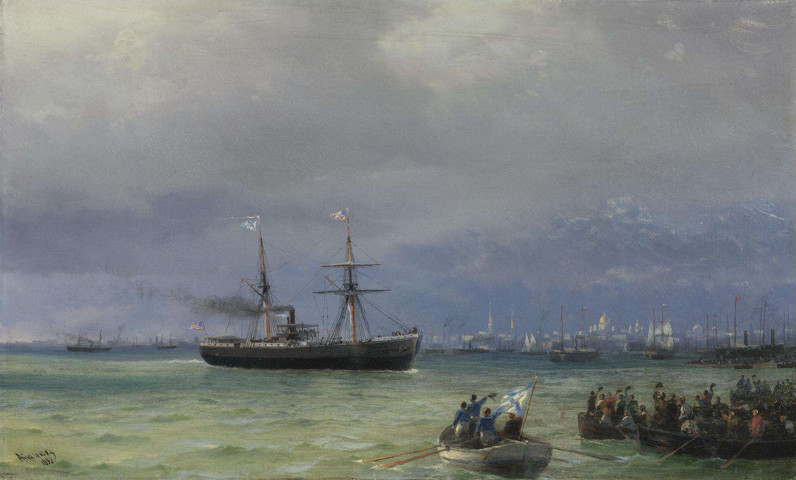 THE RELIEF SHIP